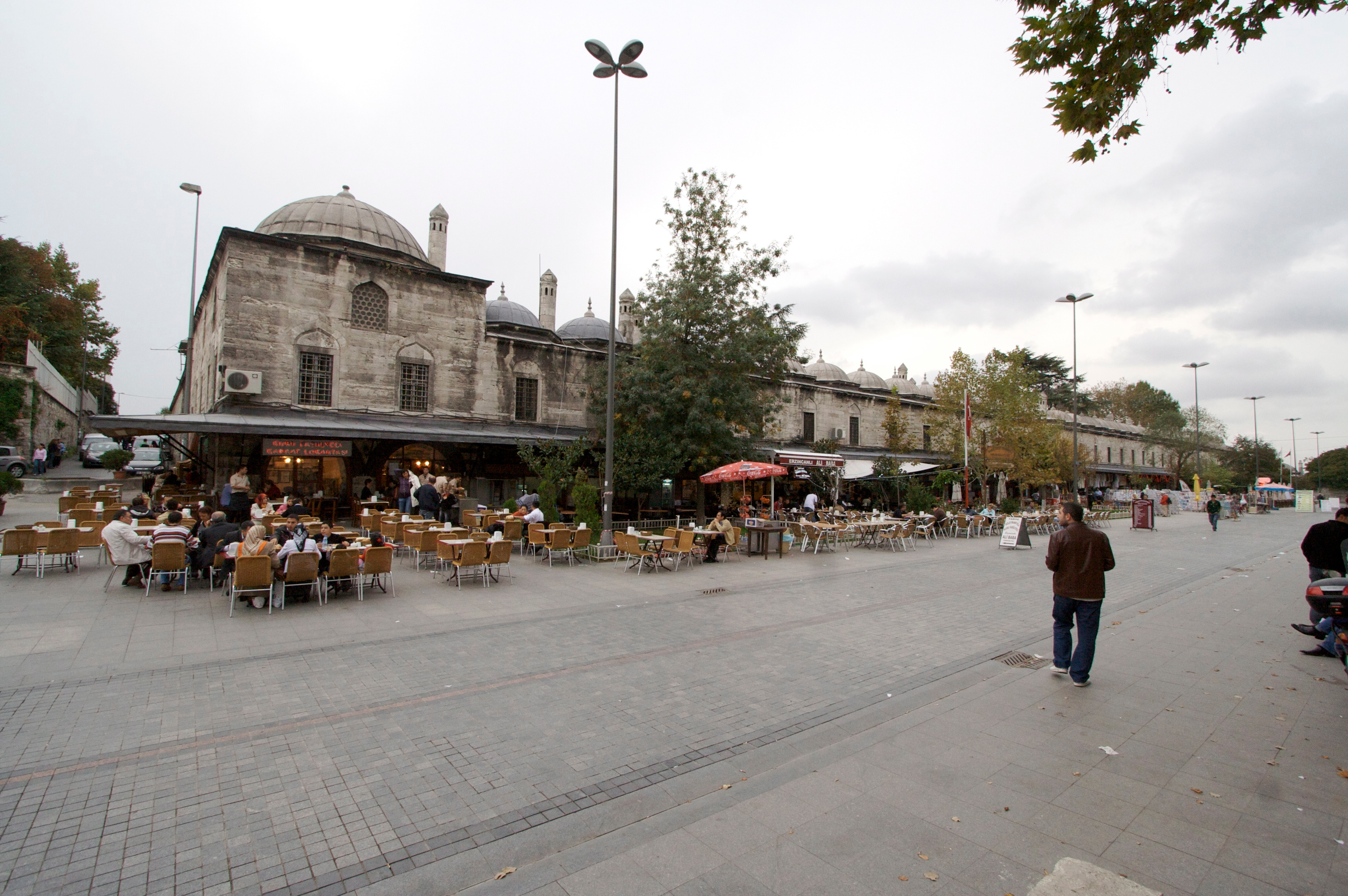 süleymaniye kuru fasülyeci lokantaları